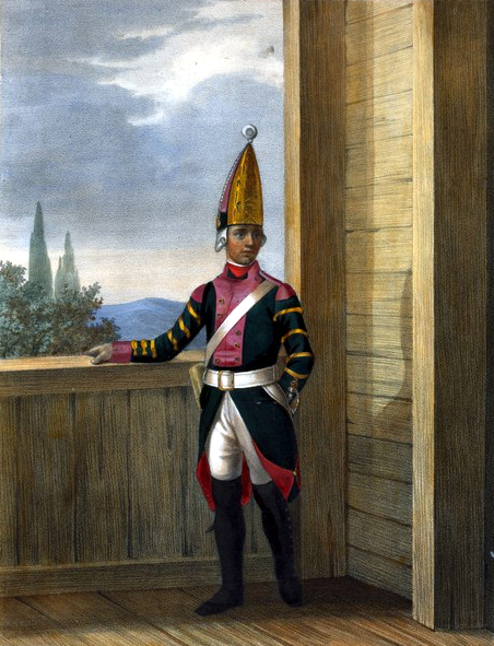 Флейщик Кексгольмского Мушкетерского полка. 1797-1801.